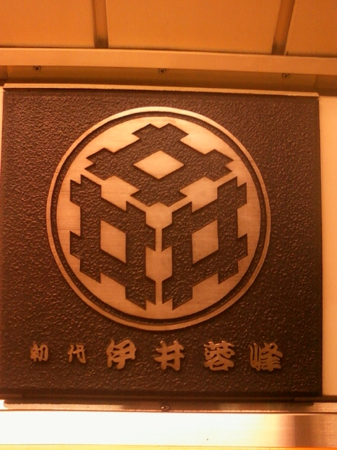 東京メトロ田原町ホームに掲示されている歌舞伎や新派の大看板の家紋プレートの一つ。伊井蓉峰-家紋プレート